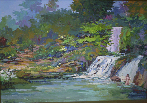 imagen del cuadro Baño en el río del artista Marco Ernesto